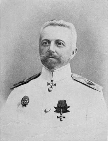 Князь Павел Петрович Ухтомский, вице-адмирал русского флота